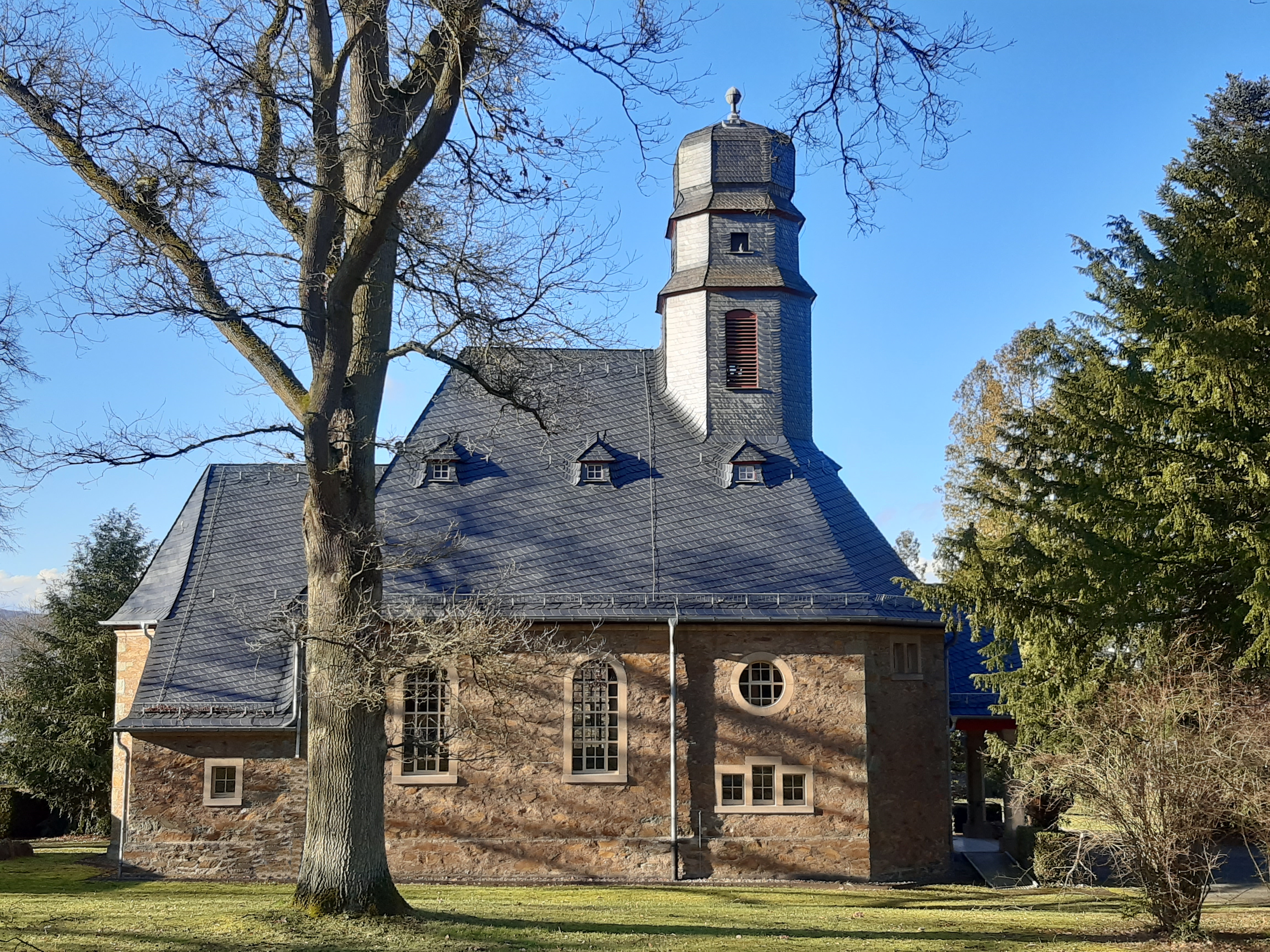 Evangelische Kirche Albshausen (Solms), Lahn-Dill-Kreis, Hessen, Deutschland